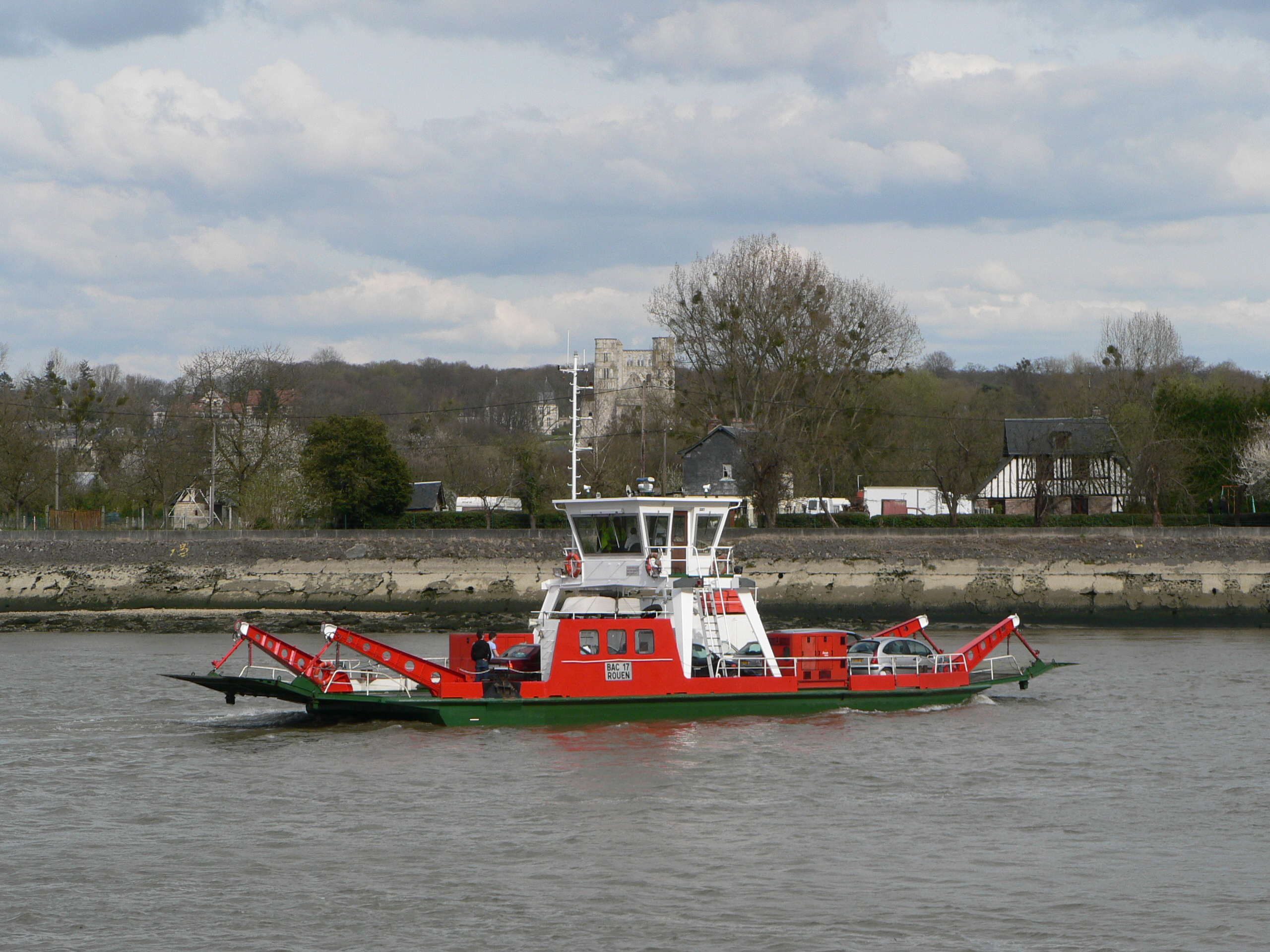 Bac 17 de JumiègesPhoto prise le 9 avril 2006Auteur : Marc LigerCopyright : image sous GFDL Marc Liger